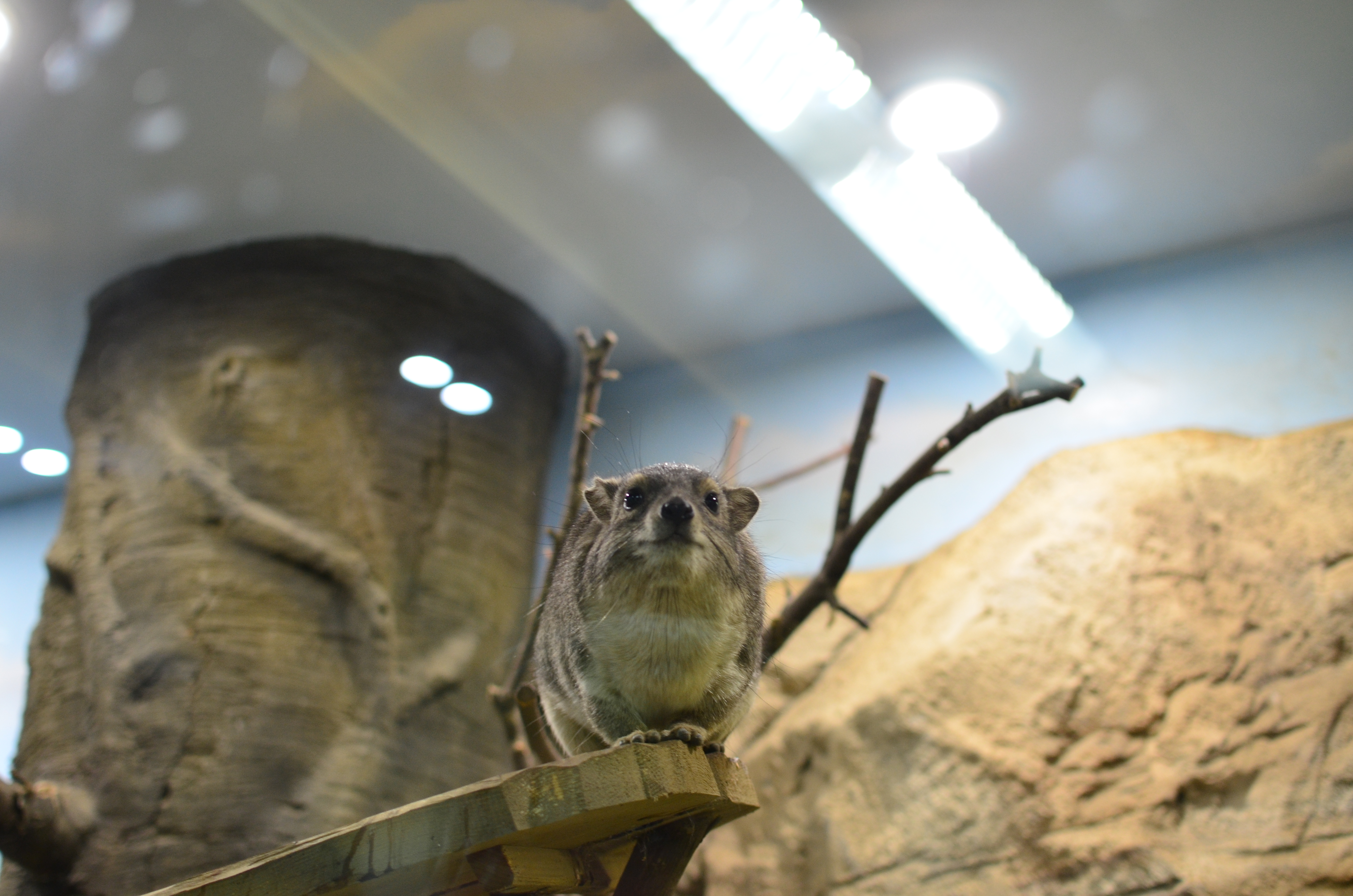 Московский зоопарк. ул. Большая Грузинская, 1